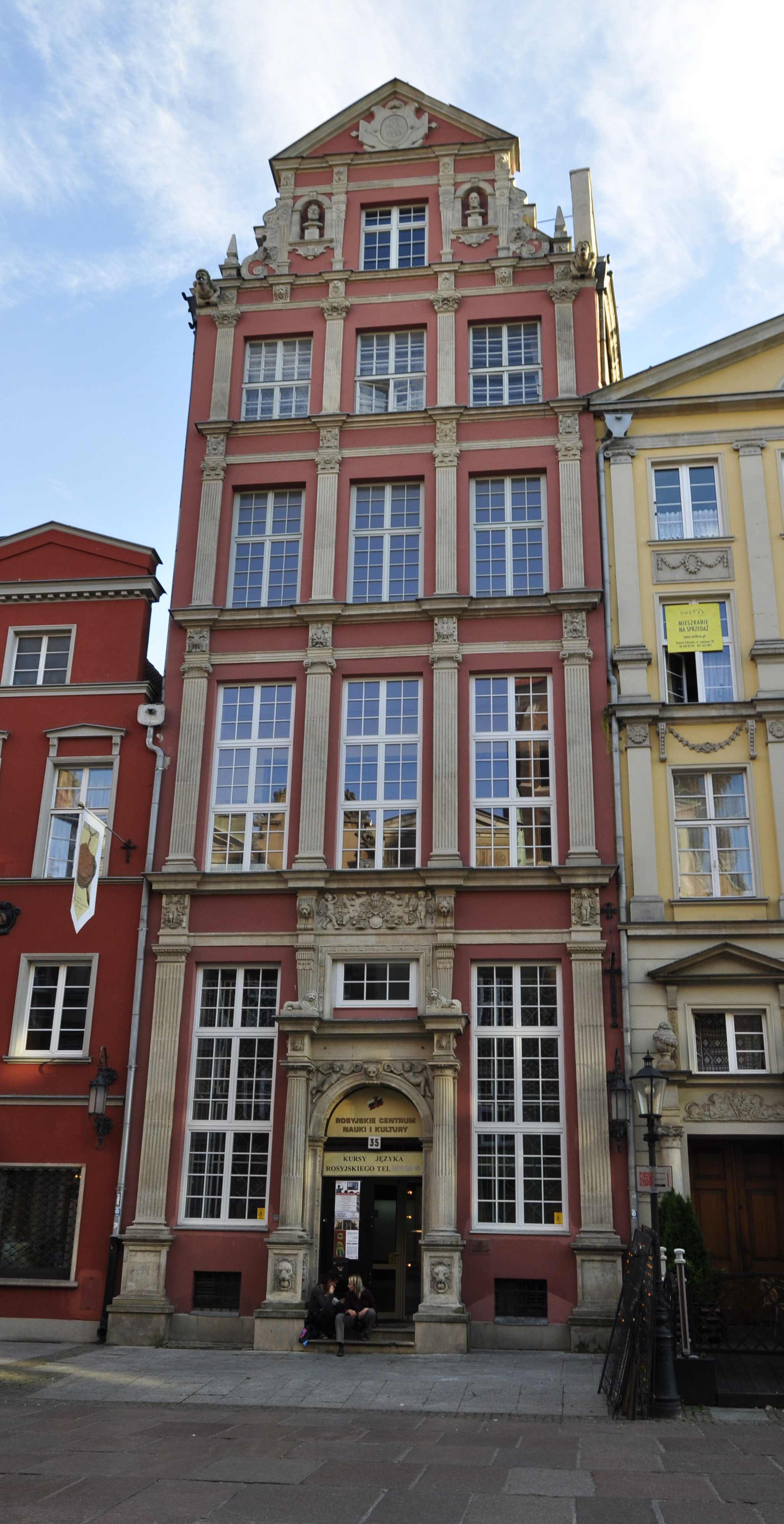 kamienica "Lwi Zamek" Gdańsk, ul. Długa 35